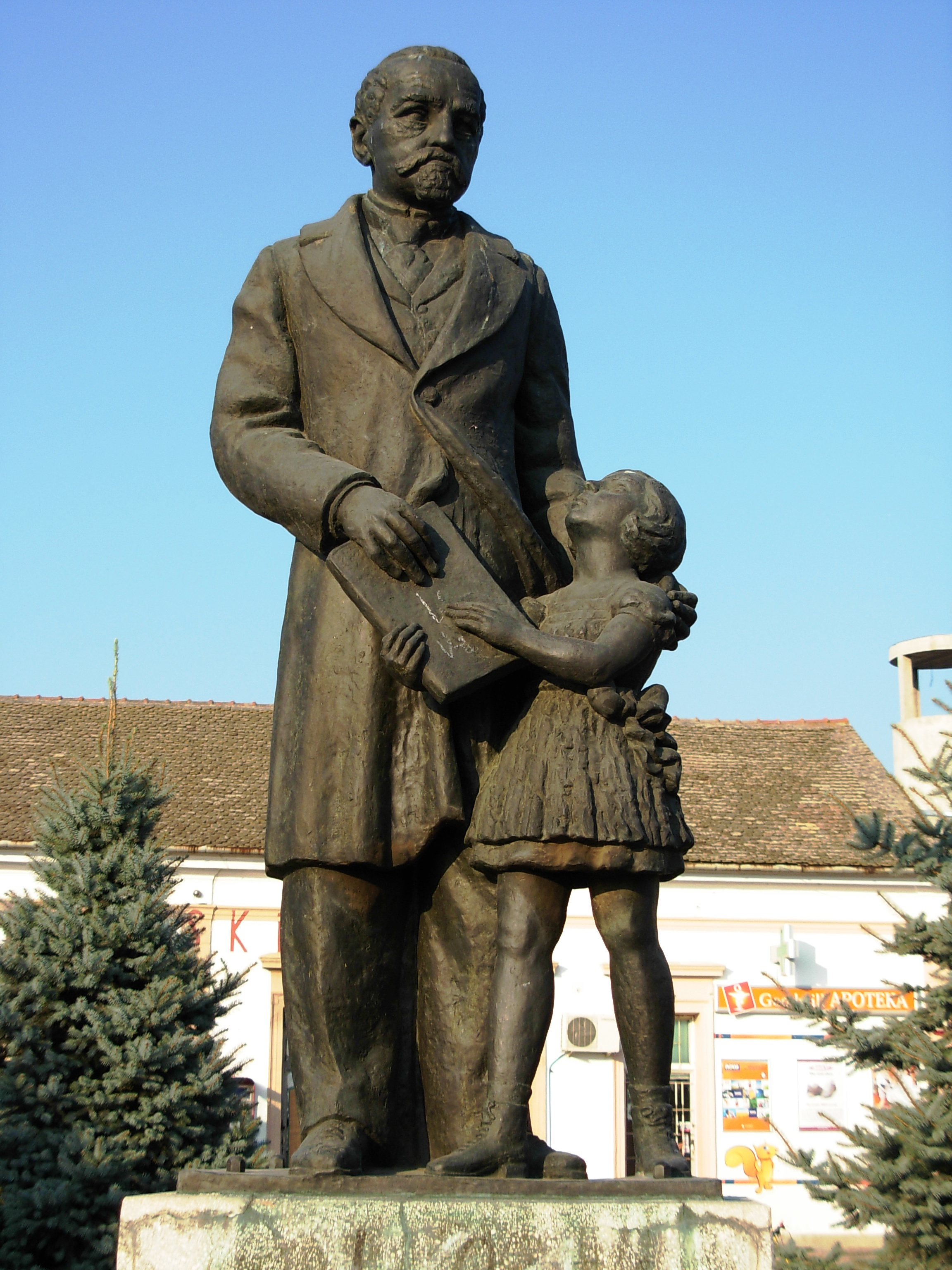 Spomenik Jovanu Jovanoviću Zmaju u centru Sremske Kamenice.